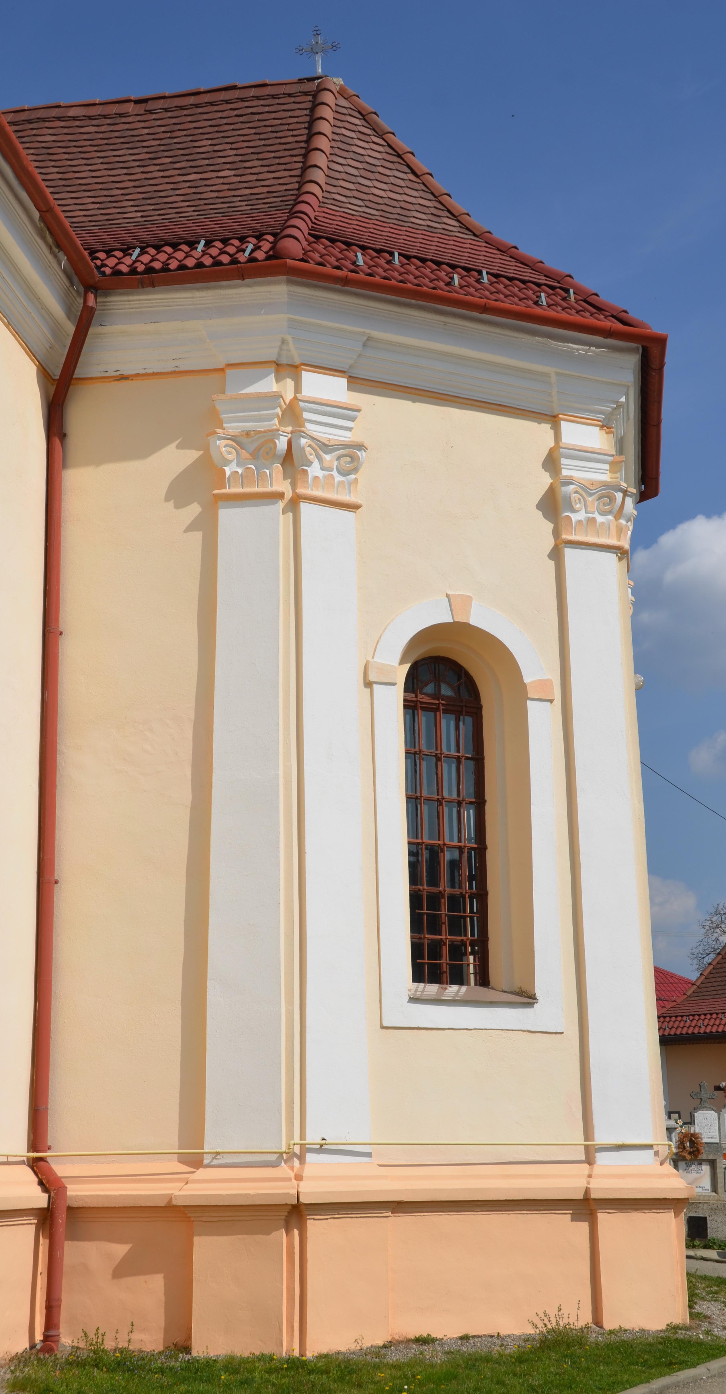 Biserica „Sf. Arhangheli”-Satulung 01